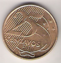 Frente da moeda de 25 centavos da segunda geração. Cunhada em 2010. This graphic was created with GIMP.